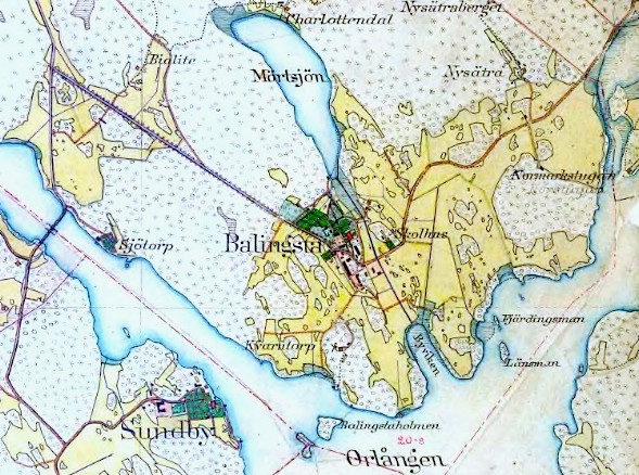 Huddinge sockenkarta1901-1906, del av Balinsta